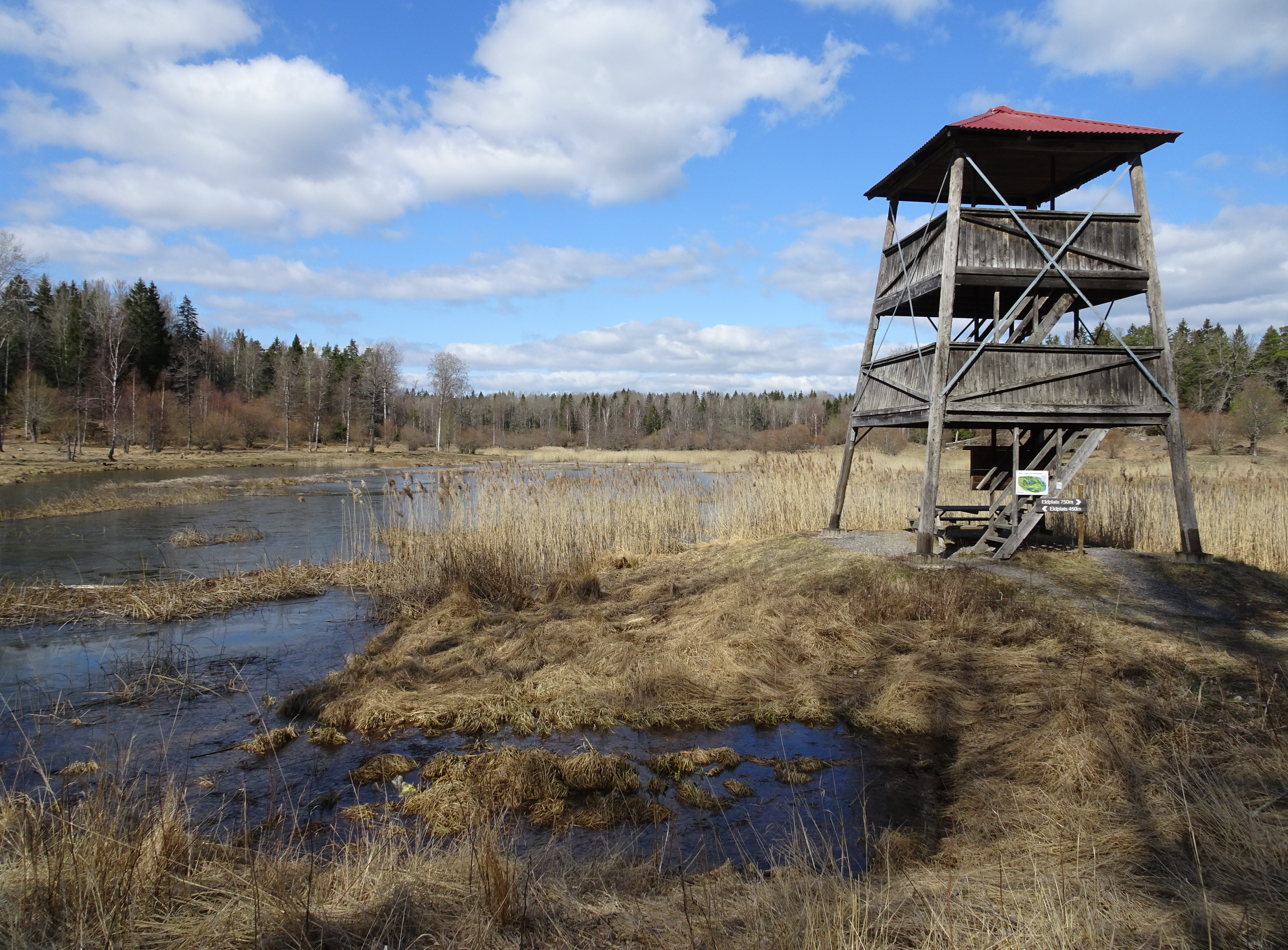 Lersjön i Lina naturreservat